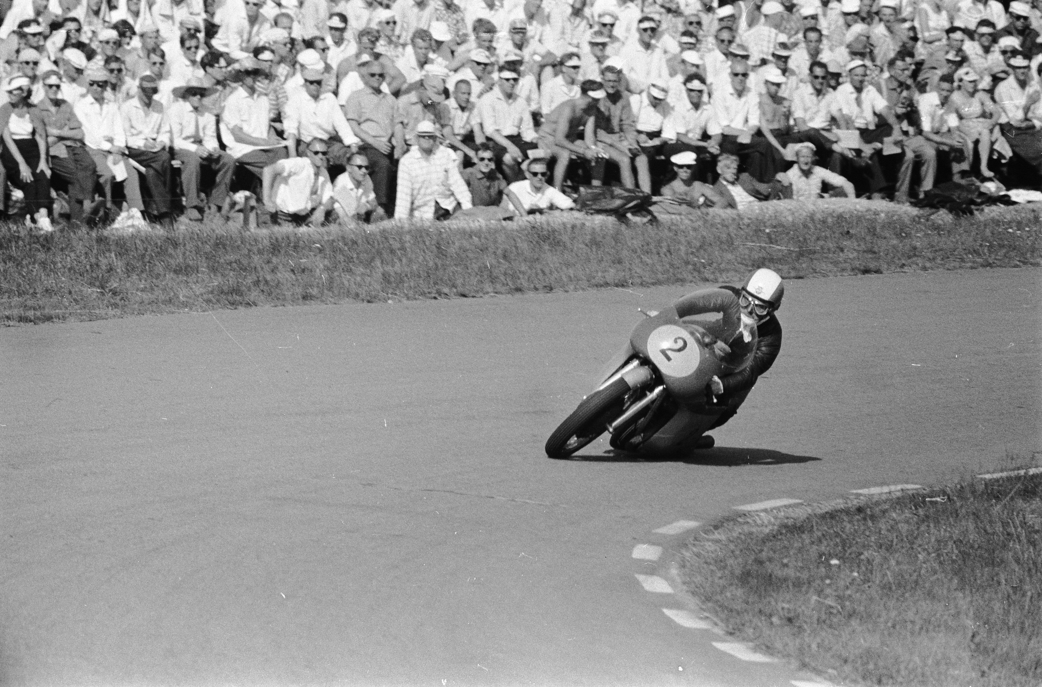 Collectie / Archief : Fotocollectie Anefo Reportage / Serie : TT Assen 1960 Beschrijving : 500cc klasse. Remo Venturi, de latere winnaar Datum : 26 juni 1960 Locatie : Assen Trefwoorden : motorsport Persoonsnaam : Venturi, Remo Instellingsnaam : TT Fotograaf : Bilsen, Joop van / Anefo Auteursrechthebbende : Nationaal Archief Materiaalsoort : Negatief (zwart/wit) Nummer archiefinventaris : bekijk toegang 2.24.01.05 Bestanddeelnummer : 911-3654